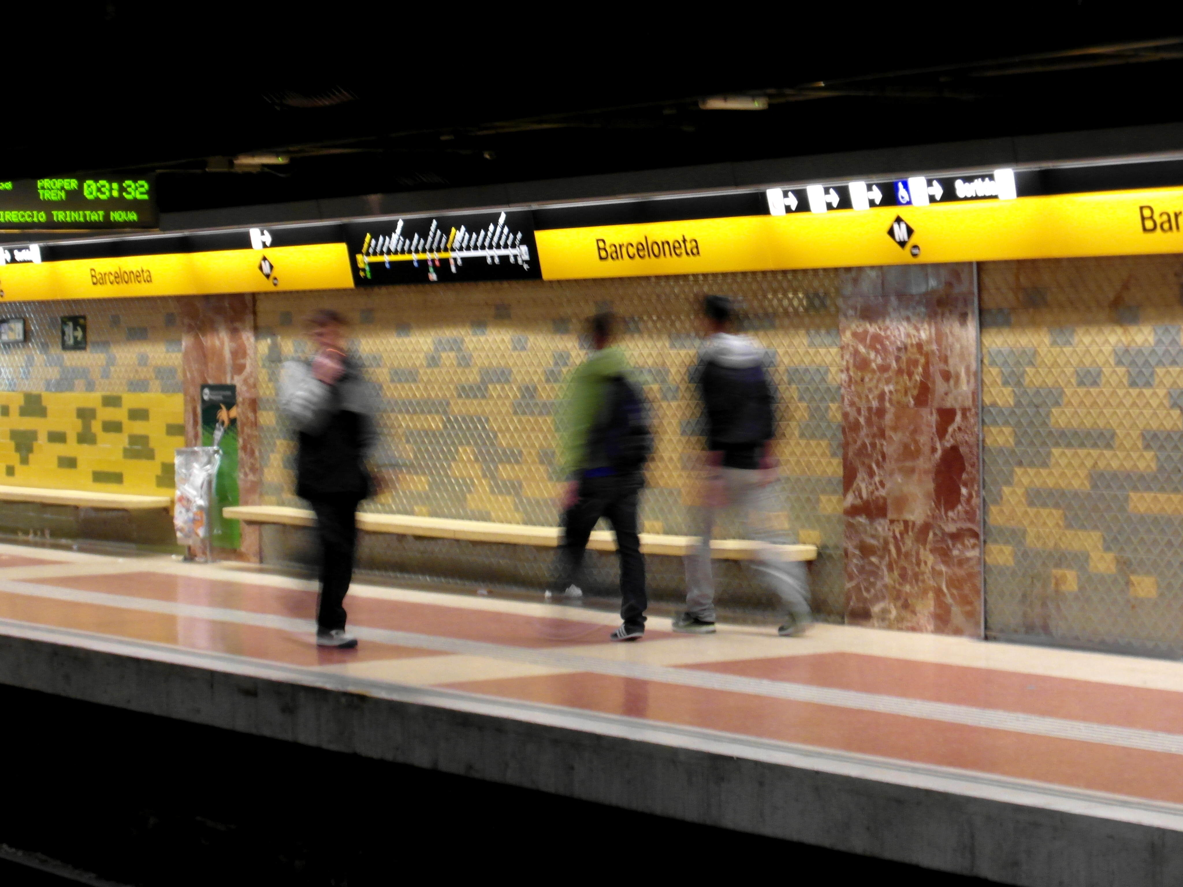 Barcelona - Metro - Estació de Barceloneta